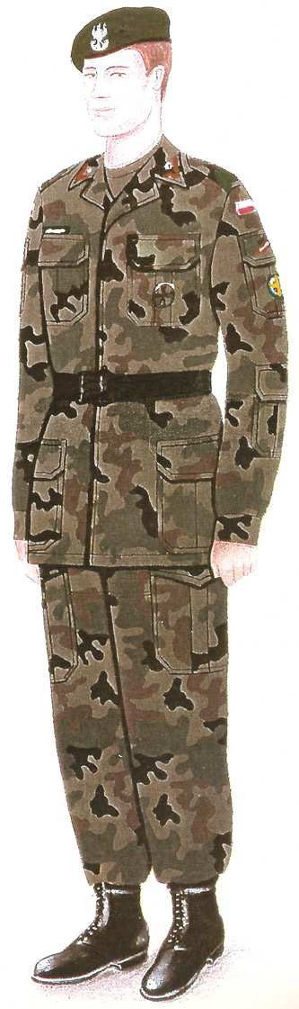 Mundury ZS "Strzelec" OSW: Ubiór polowy wz. 93. 1999